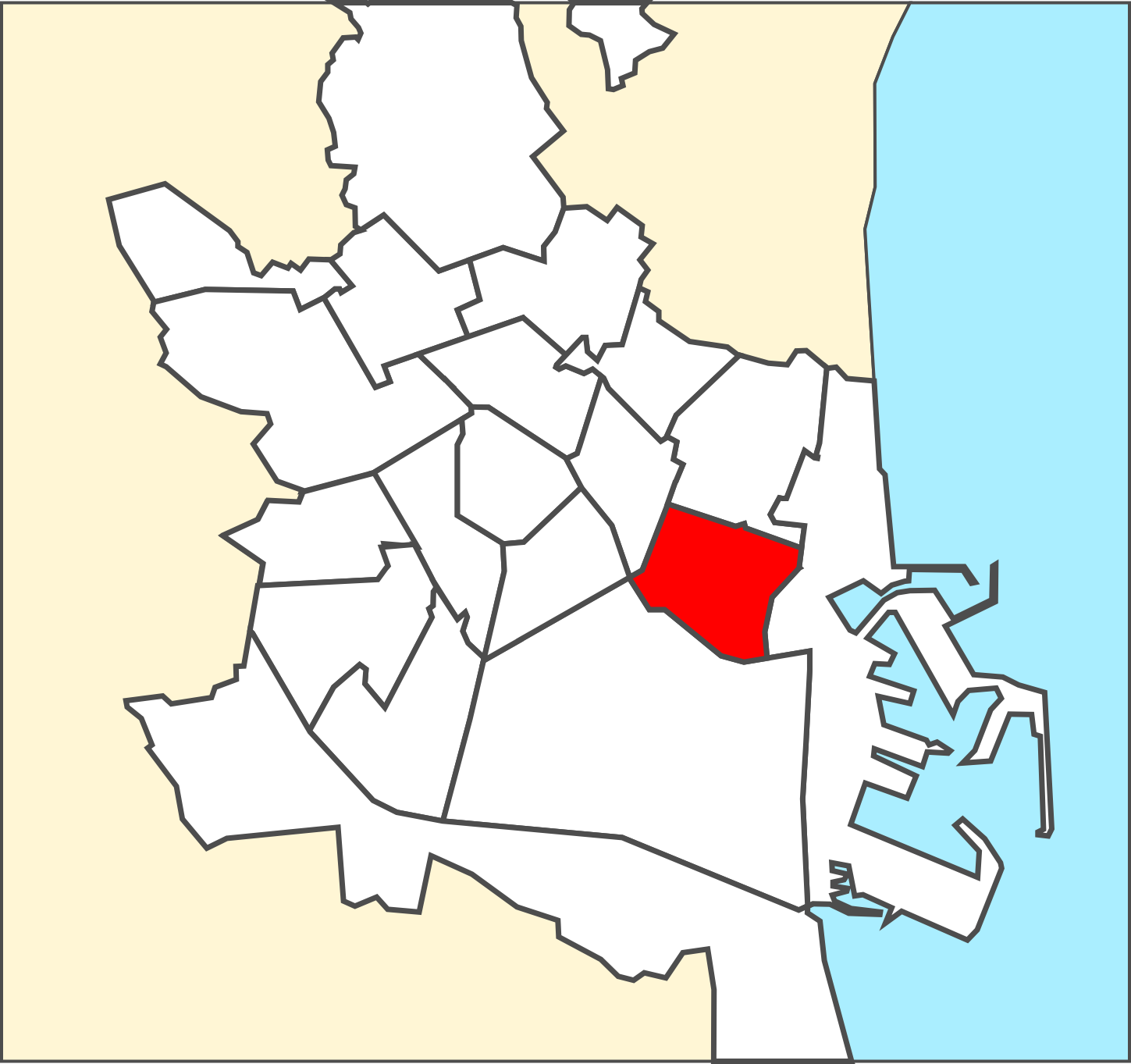 Districte de Camins al Grau.